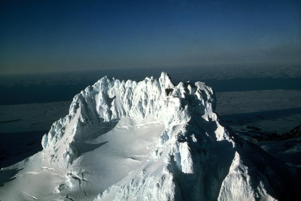 Isanotski Peaks volcano, Alaska, USA